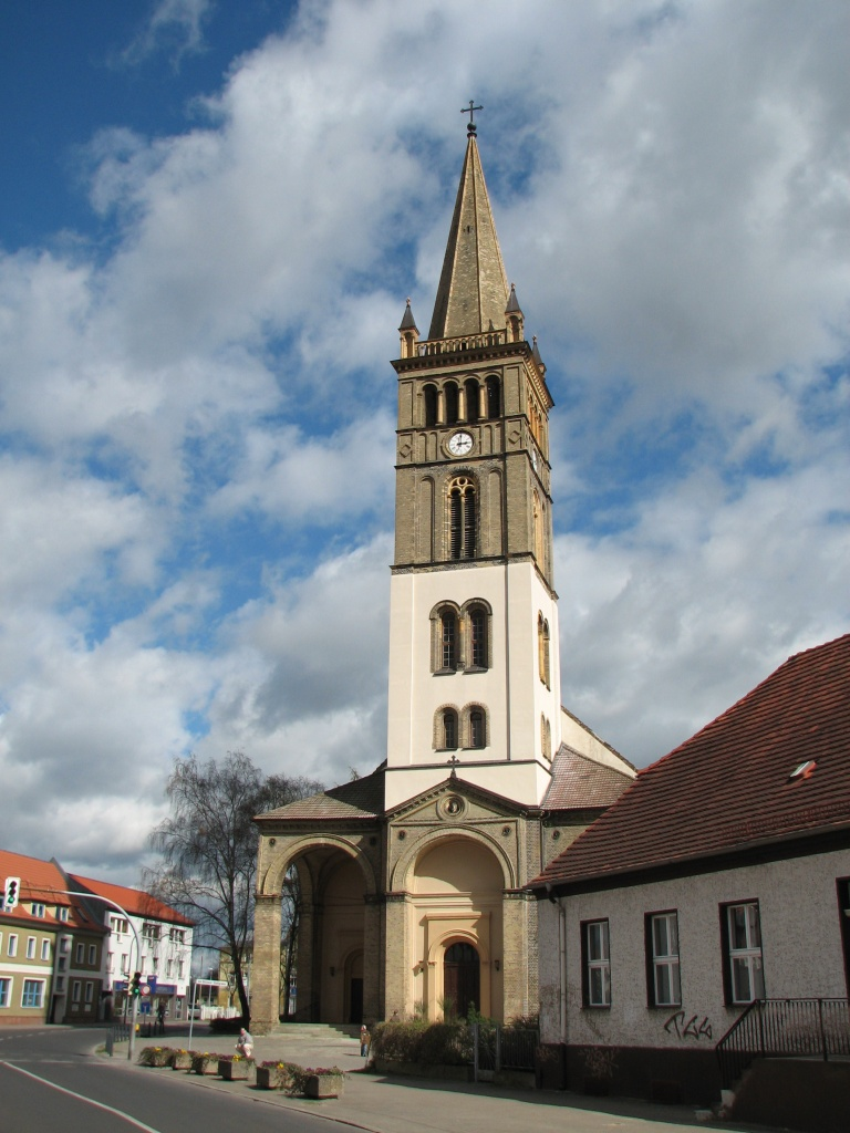 evangelische St.-Nicolai-Kirche in Oranienburg, Land Brandenburg, Deutschland